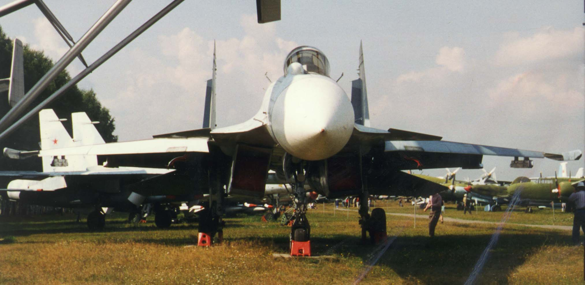 Su-35 Prototype